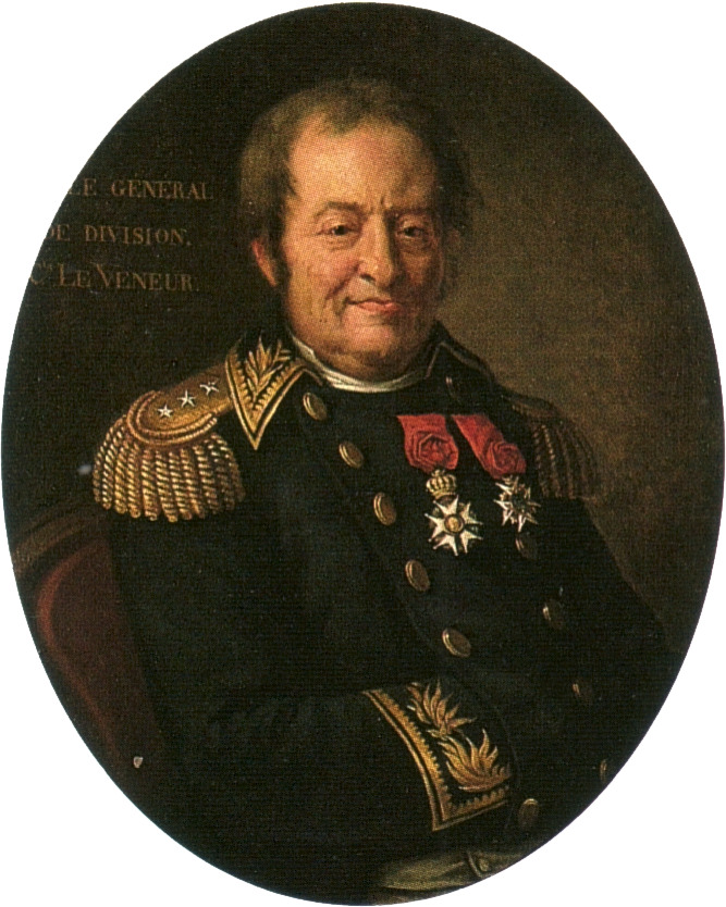 Porträt des französischen Generals Alexis Le Veneur de Tillières